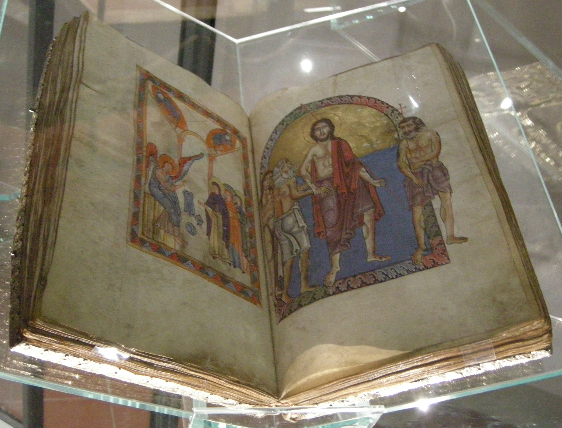 Museo diocesano nonantola, evangeliario di matilde di canossa, miniature di scrpt. di nonantola Xi-XII sec